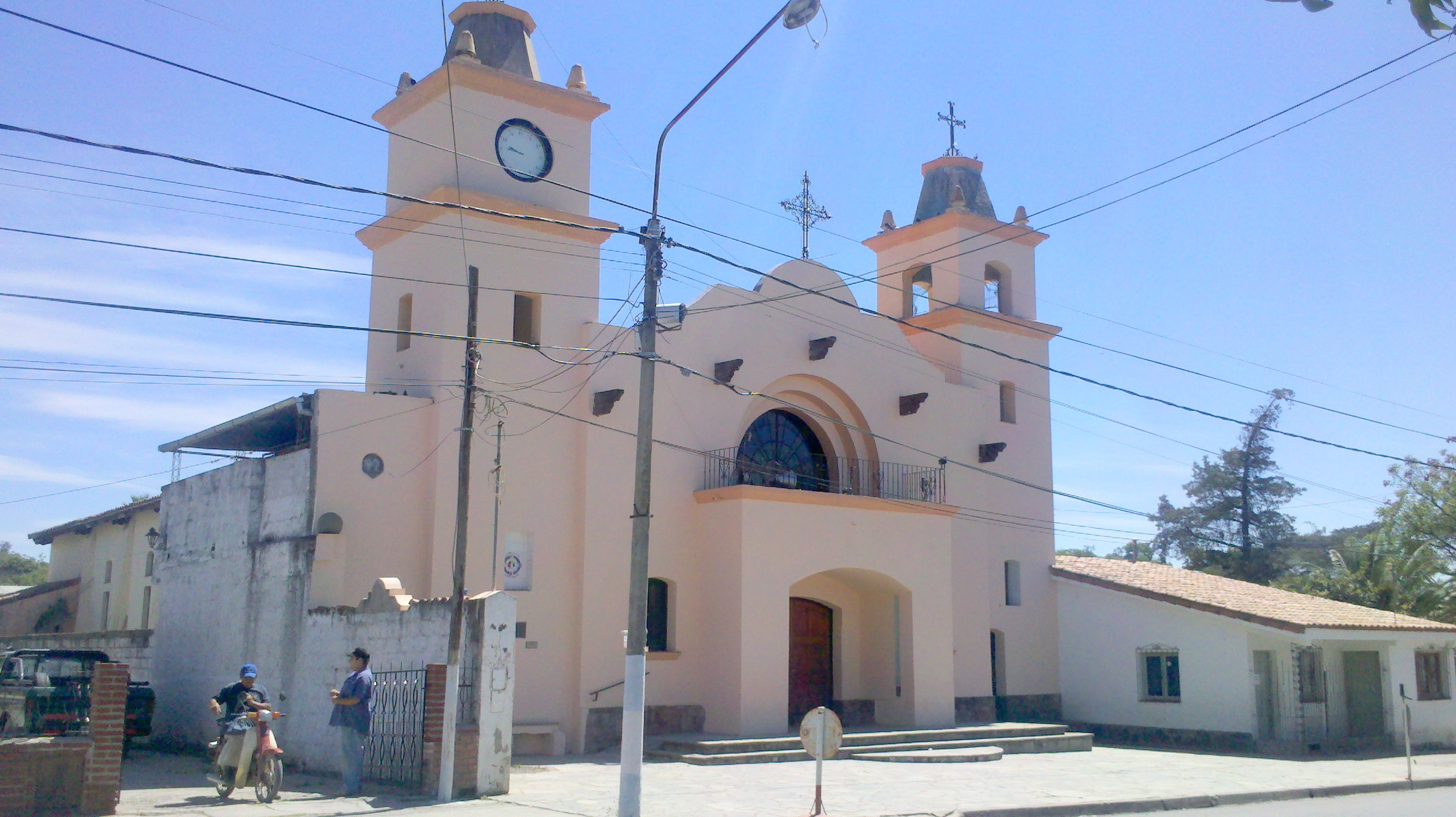 Iglesia - Campo Quijano - Rosario de Lerma